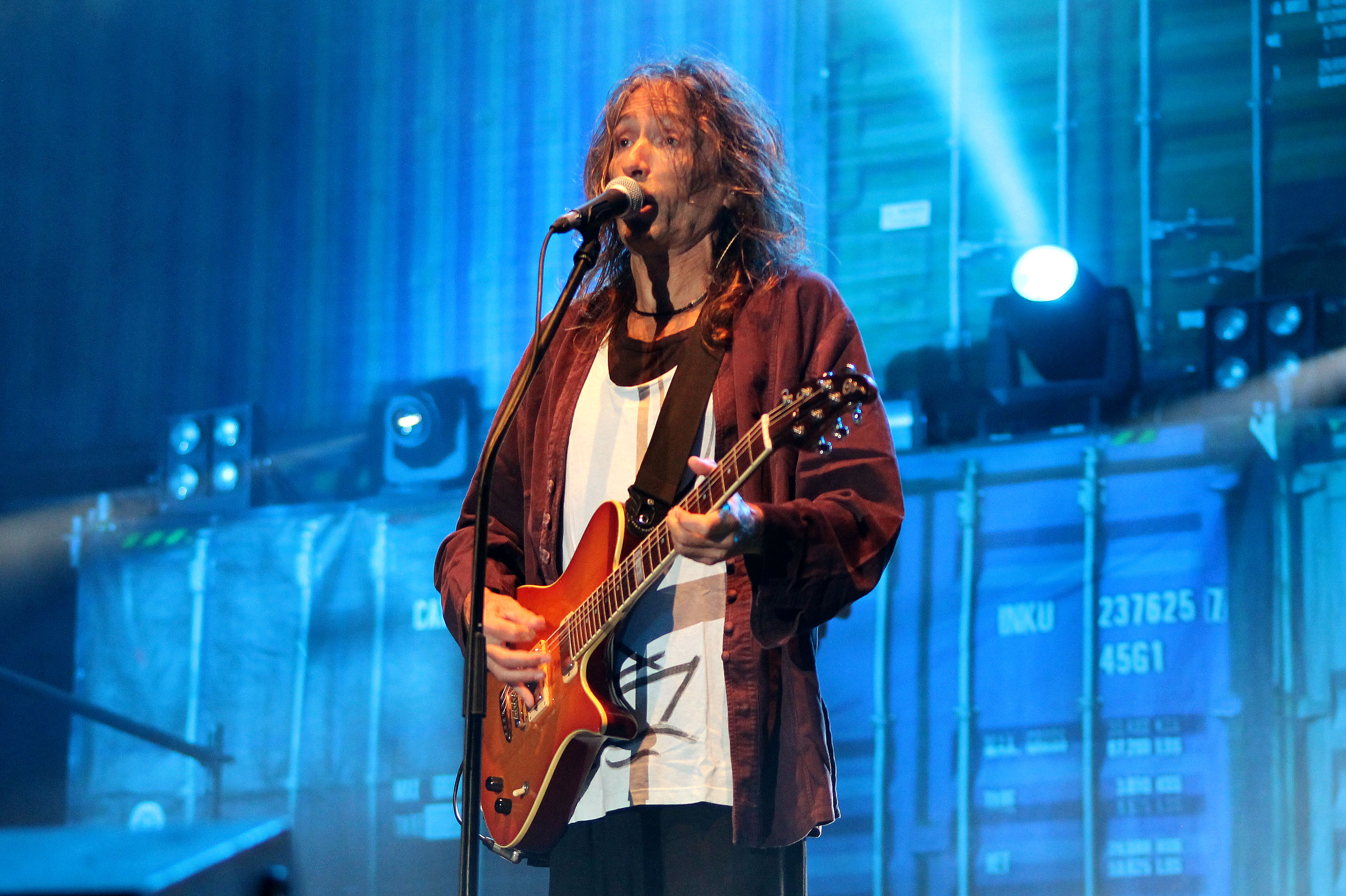 Extremoduro en su gira realizada en el año 2014.